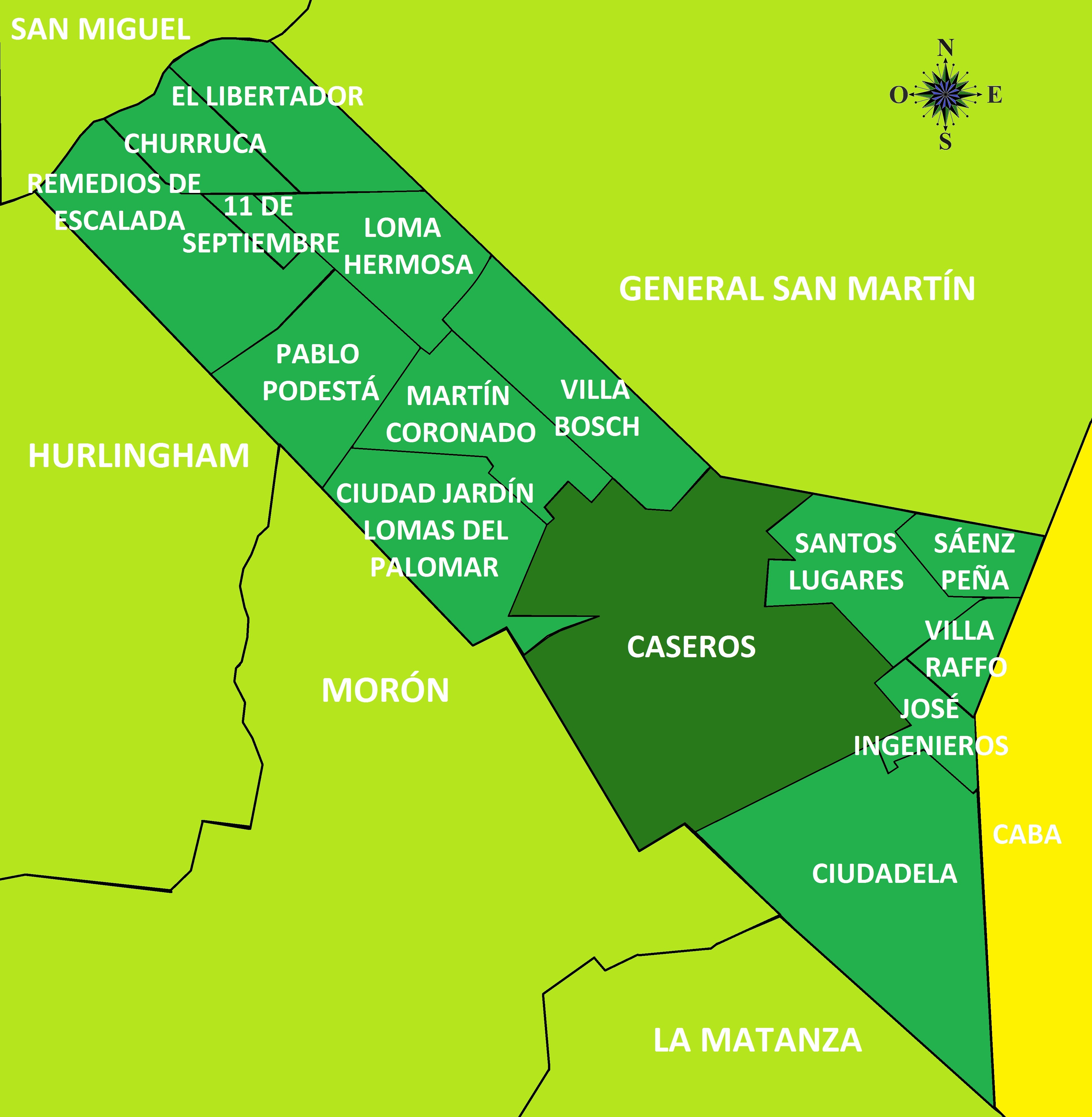 Localidades del partido de 3 de febrero.